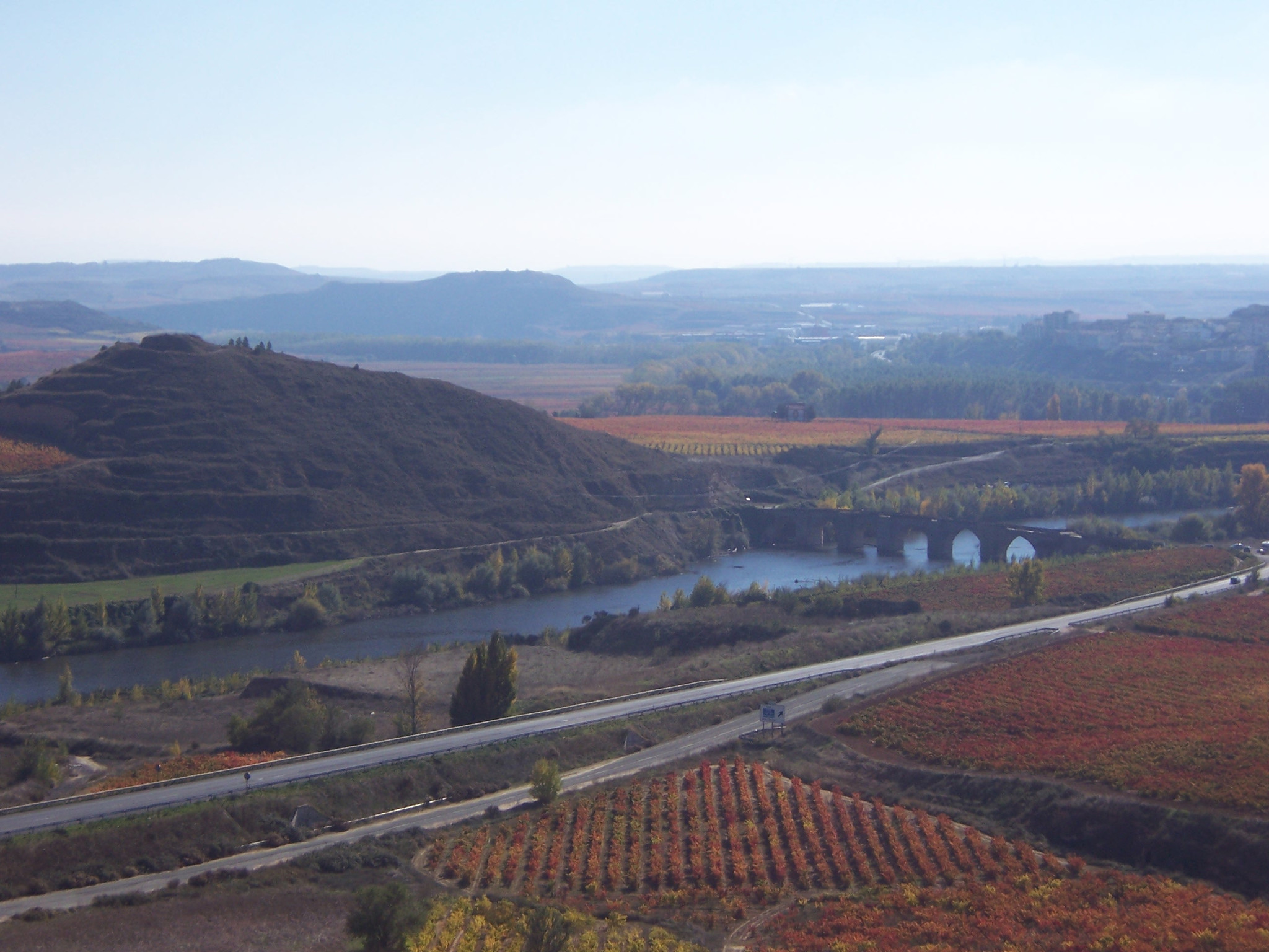 Puente de Briñas sobre el río Ebro en Haro, La Rioja (España)